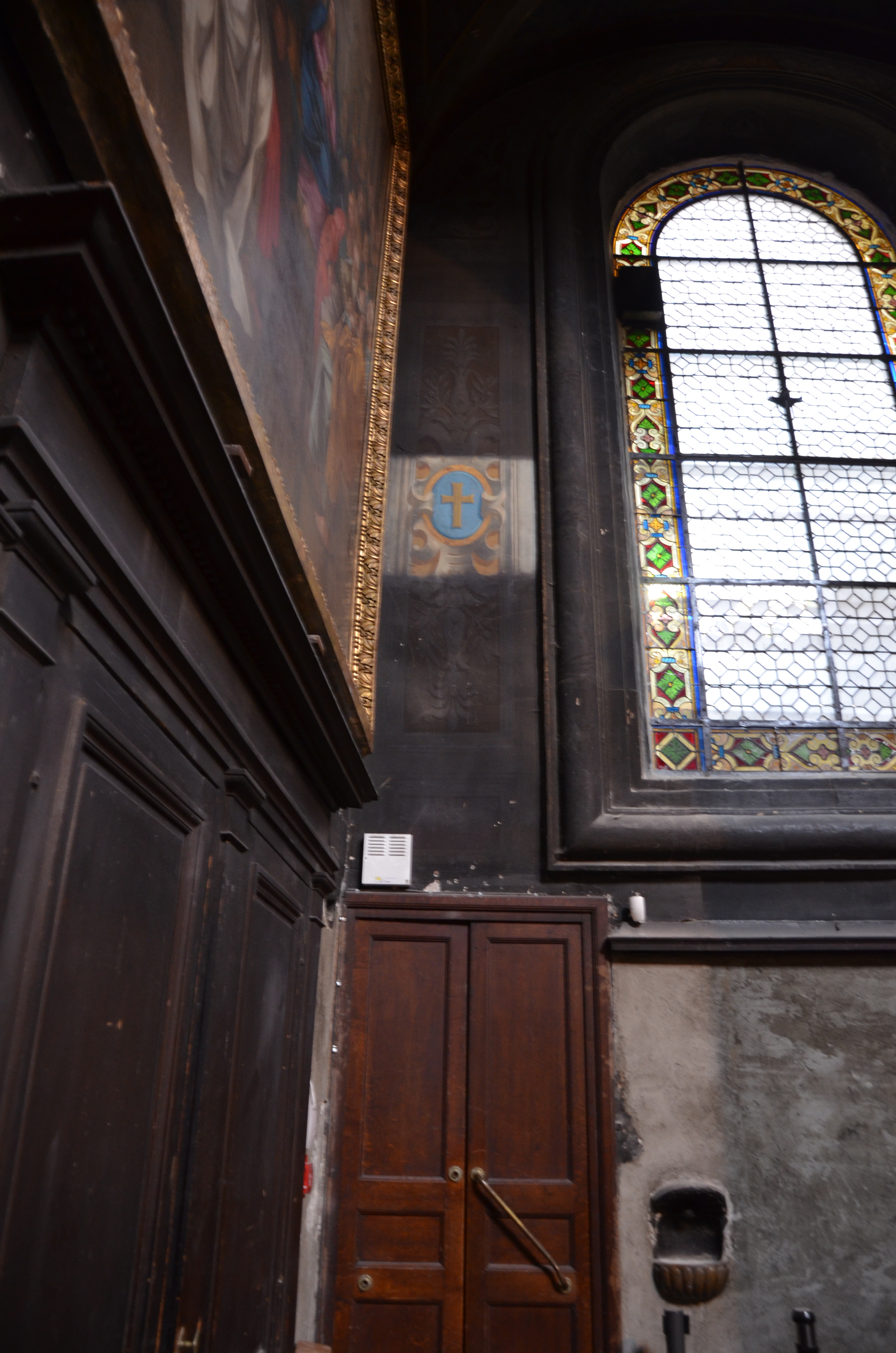 Chapelle de l'Hôtel-Dieu de Lyon - Chapelle d'accès, Nord - Détail de l'angle Nord-Ouest, sondage sur le mure Nord. Cliché pris pendant les Journées européennes du patrimoine 2016 et l'Edithaton HCL-Wikimedia France